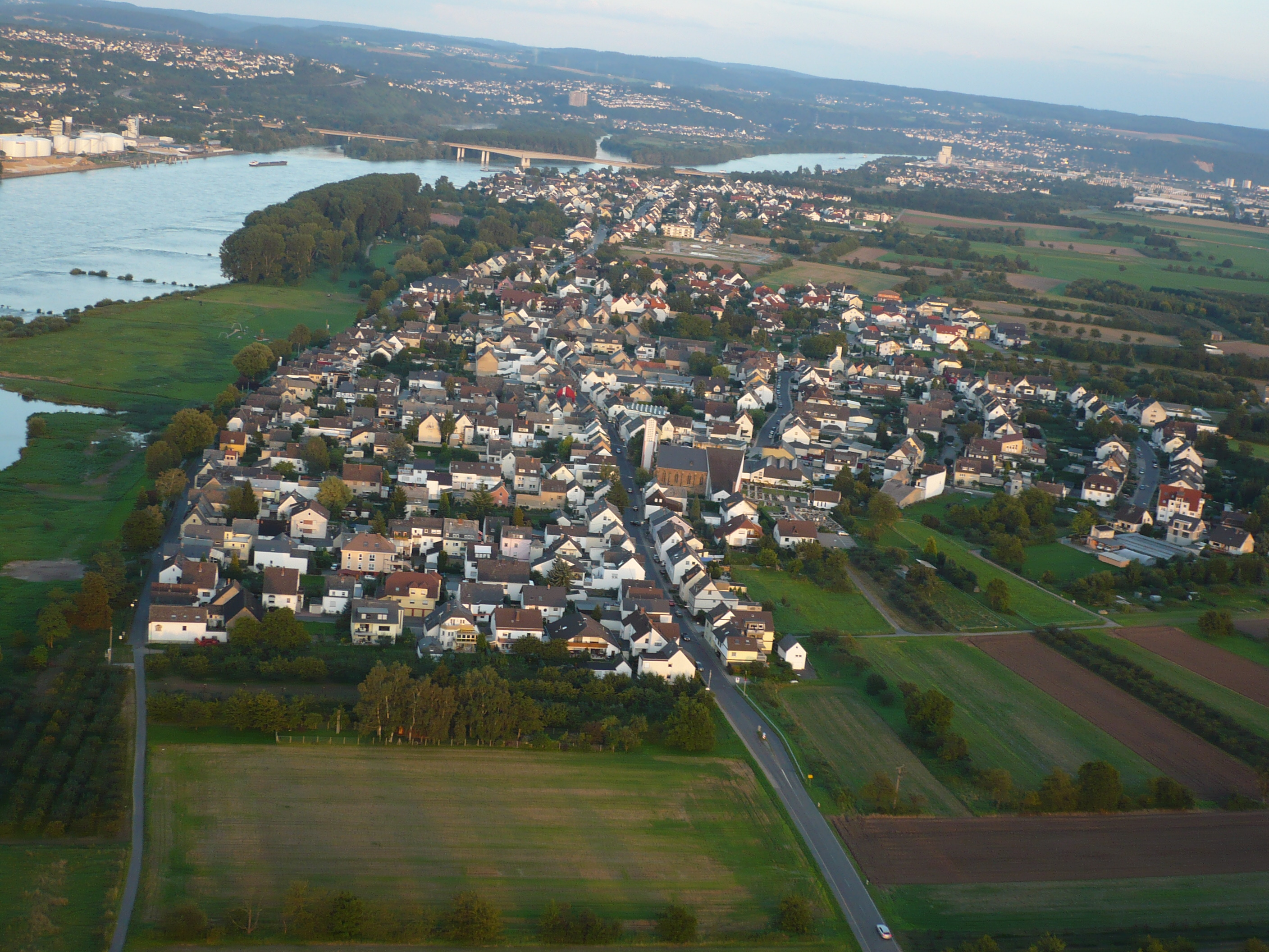 Luftaufnahme Kaltenengers